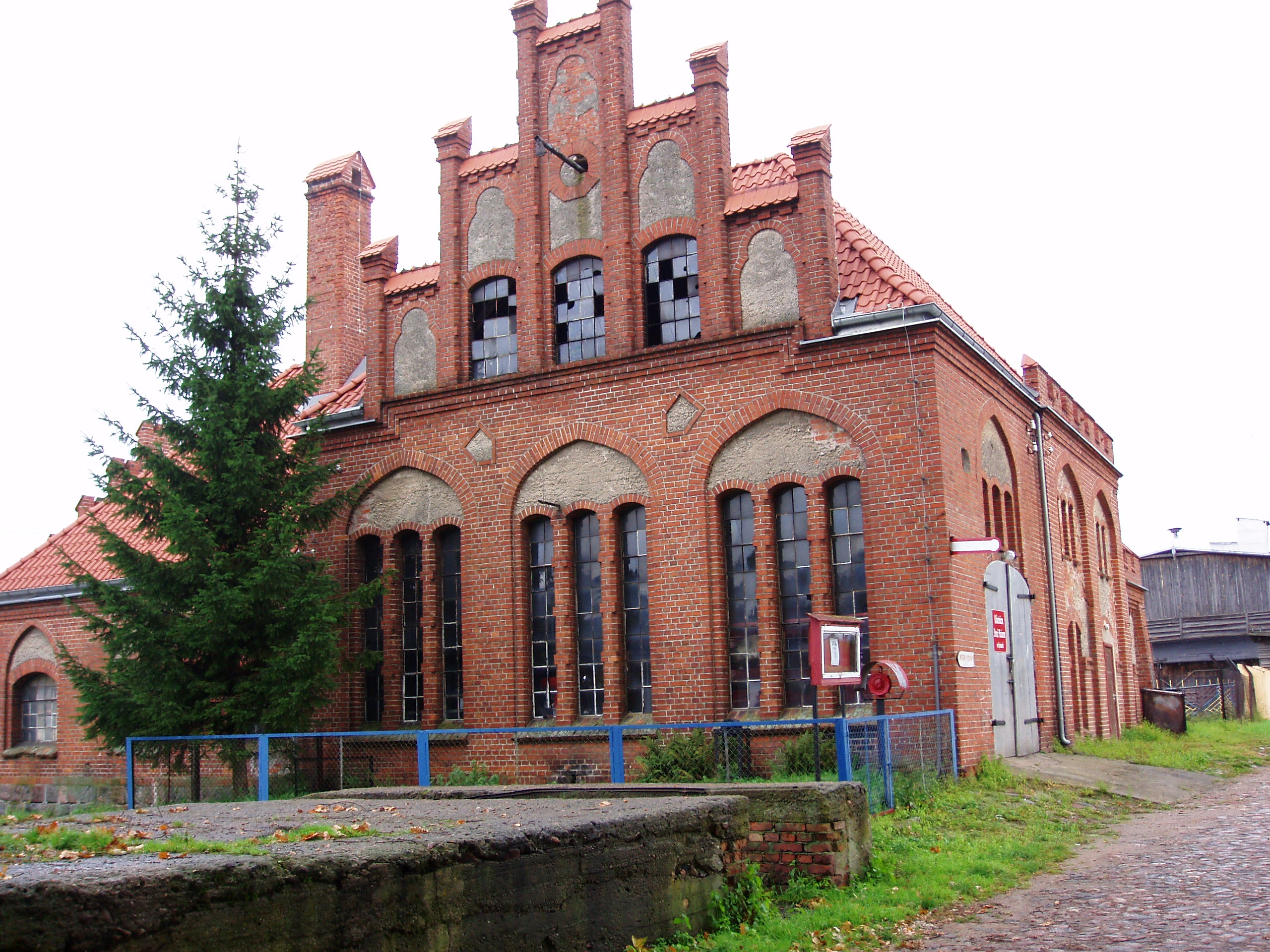 Łężany - zespół zabudowy folwarcznej XIX/XX w.: budynek ochotniczej straży pożarnej (zabytek nr A-4304 i A-2681 z 29.06.2004)